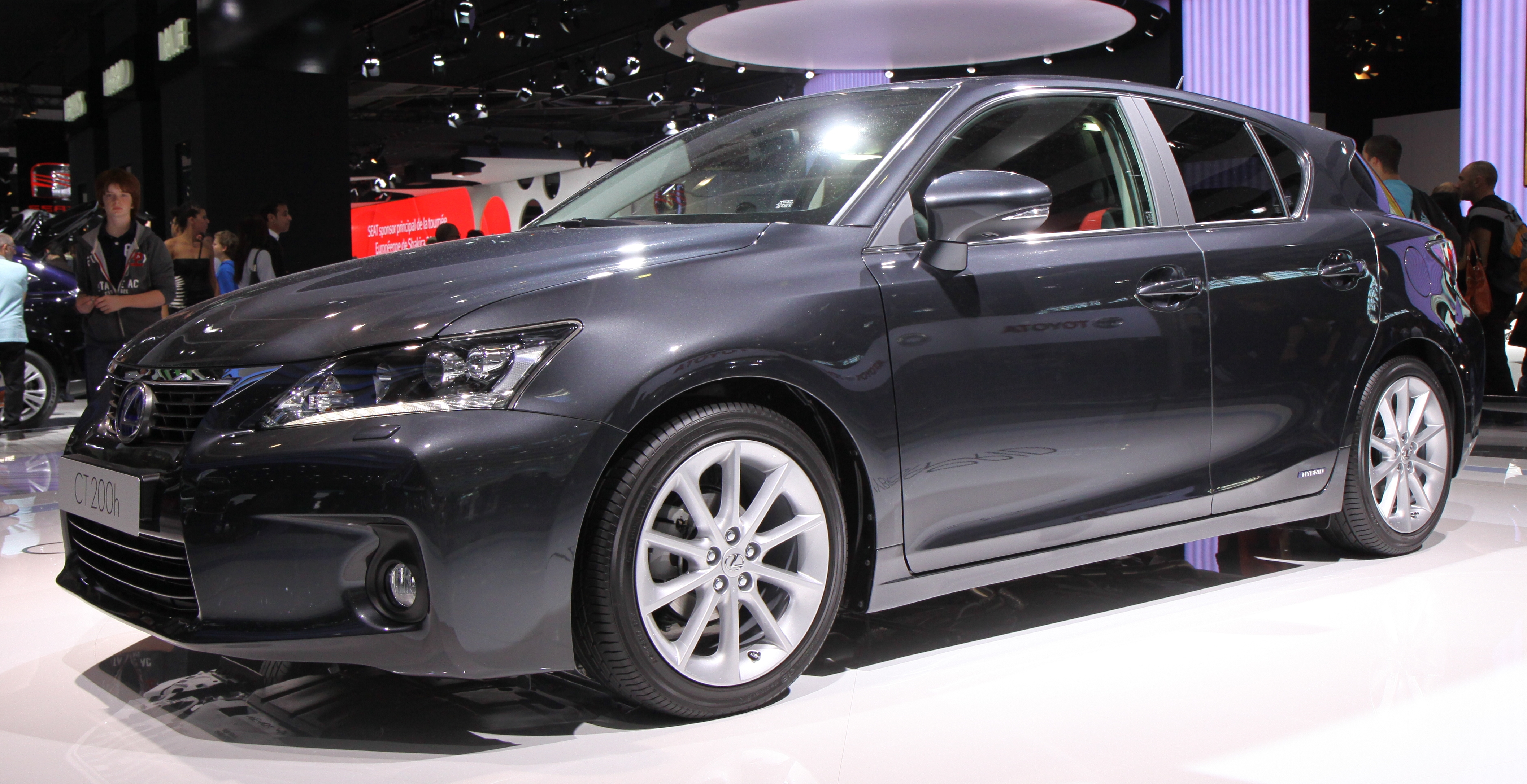 Paris - Mondial de l'automobile 2010